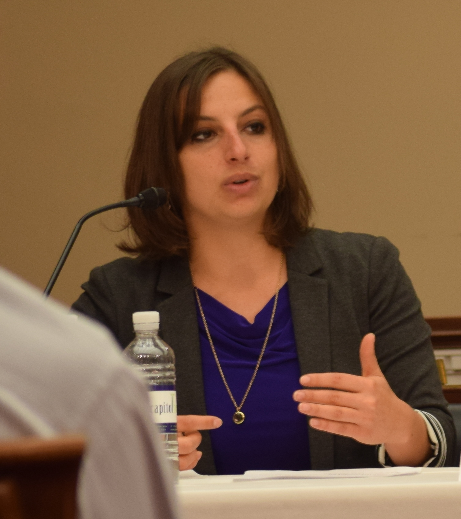 Tal Kopan, Mary Anne Franks, Emma Llanso (L-R)